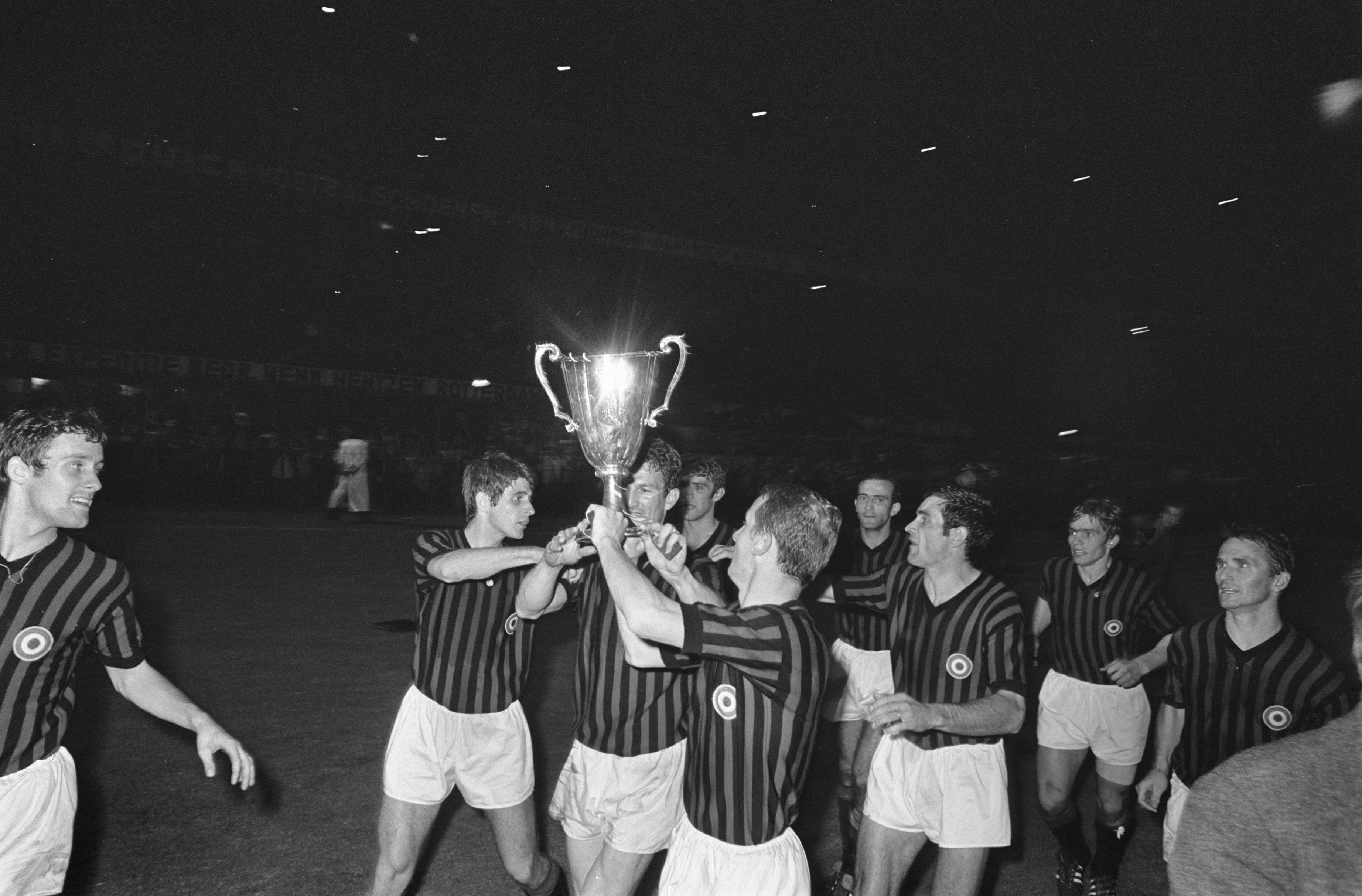 Collectie / Archief : Fotocollectie Anefo Reportage / Serie : [ onbekend ] Beschrijving : Finale Europa Cup II AC Milan tegen HSV Hamburg 2-0. Spelers van Milan maken rondje over veld Datum : 23 mei 1968 Locatie : Rotterdam Trefwoorden : voetbal, voetballers Instellingsnaam : AC Milaan Fotograaf : Kroon, Ron / Anefo Auteursrechthebbende : Nationaal Archief Materiaalsoort : Negatief (zwart/wit) Nummer archiefinventaris : bekijk toegang 2.24.01.05 Bestanddeelnummer : 921-3777